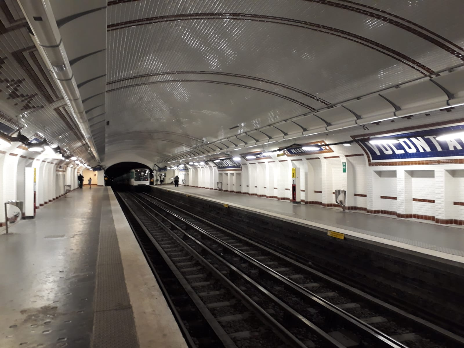 Station Volontaires vue le 24 novembre 2018, alors que la pose des carreaux est presque terminée.